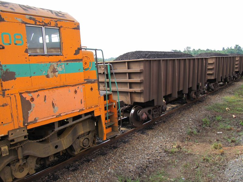 Chargement de minerai sur le transgabonais